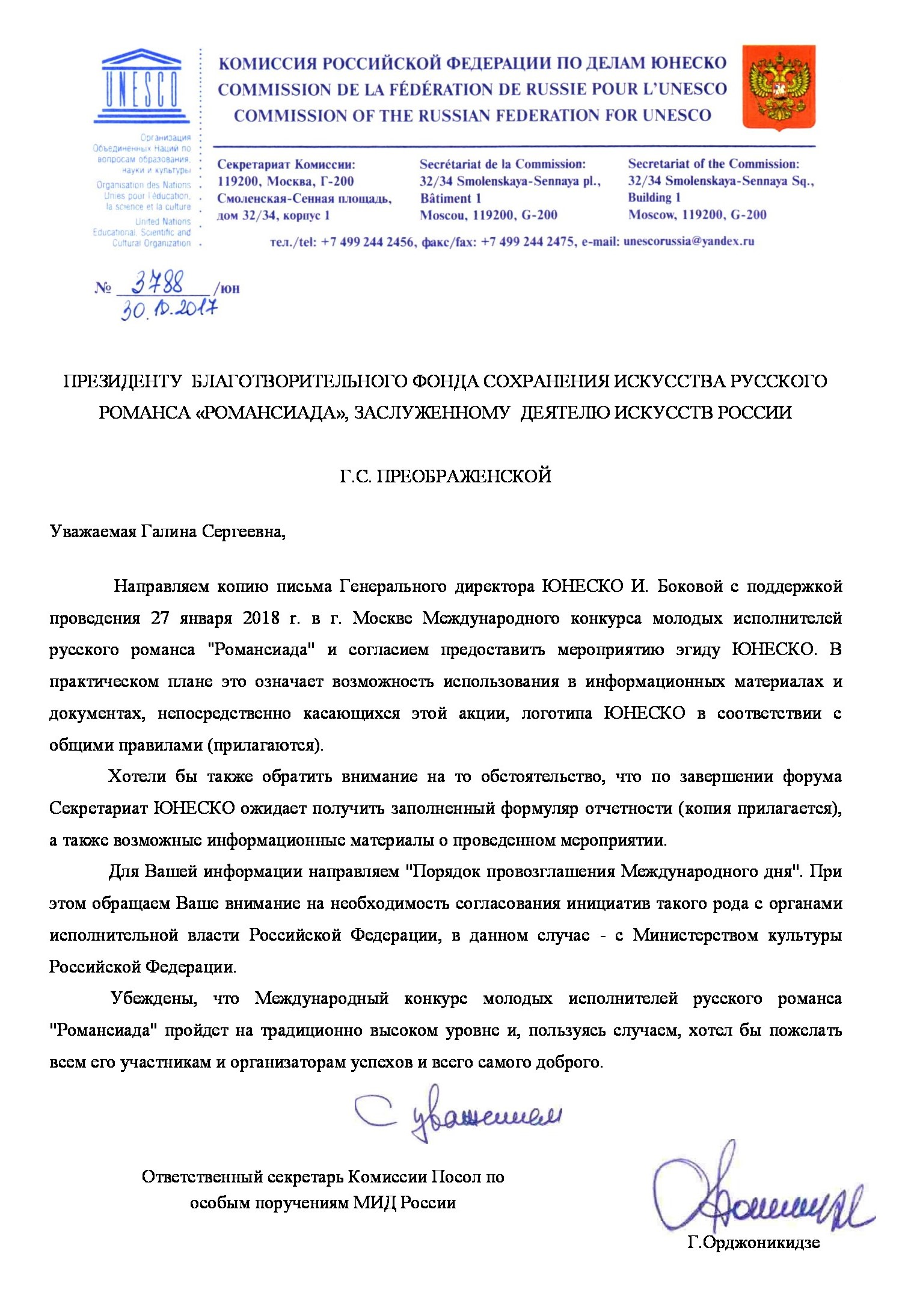 Письмо о предоставлении эгиды ЮНЕСКОRomână: Scrisoare de la Comisia Federației Ruse pentru UNESCO, adresată președintelui unui fond de caritate (în rusă)